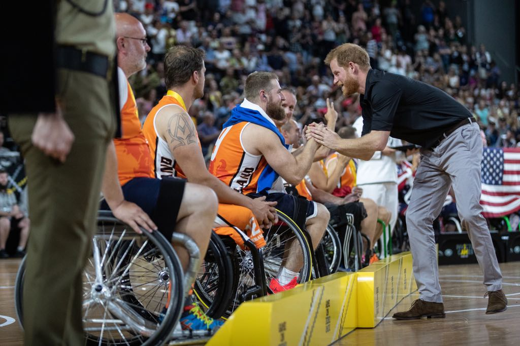 De Nederlandse ploeg mocht vandaag wederom optreden in de apotheose van de spelen, de finale rolstoelbasketbal. Na een vermakelijke halve finale tegen Nieuw-Zeeland (26-13), bleek De VS net als vorig jaar een maatje te groot voor de ploeg van aanvoerder Van der Steen. “We hadden kansen en die moet je in zo’n wedstrijd benutten”, was zijn oordeel.